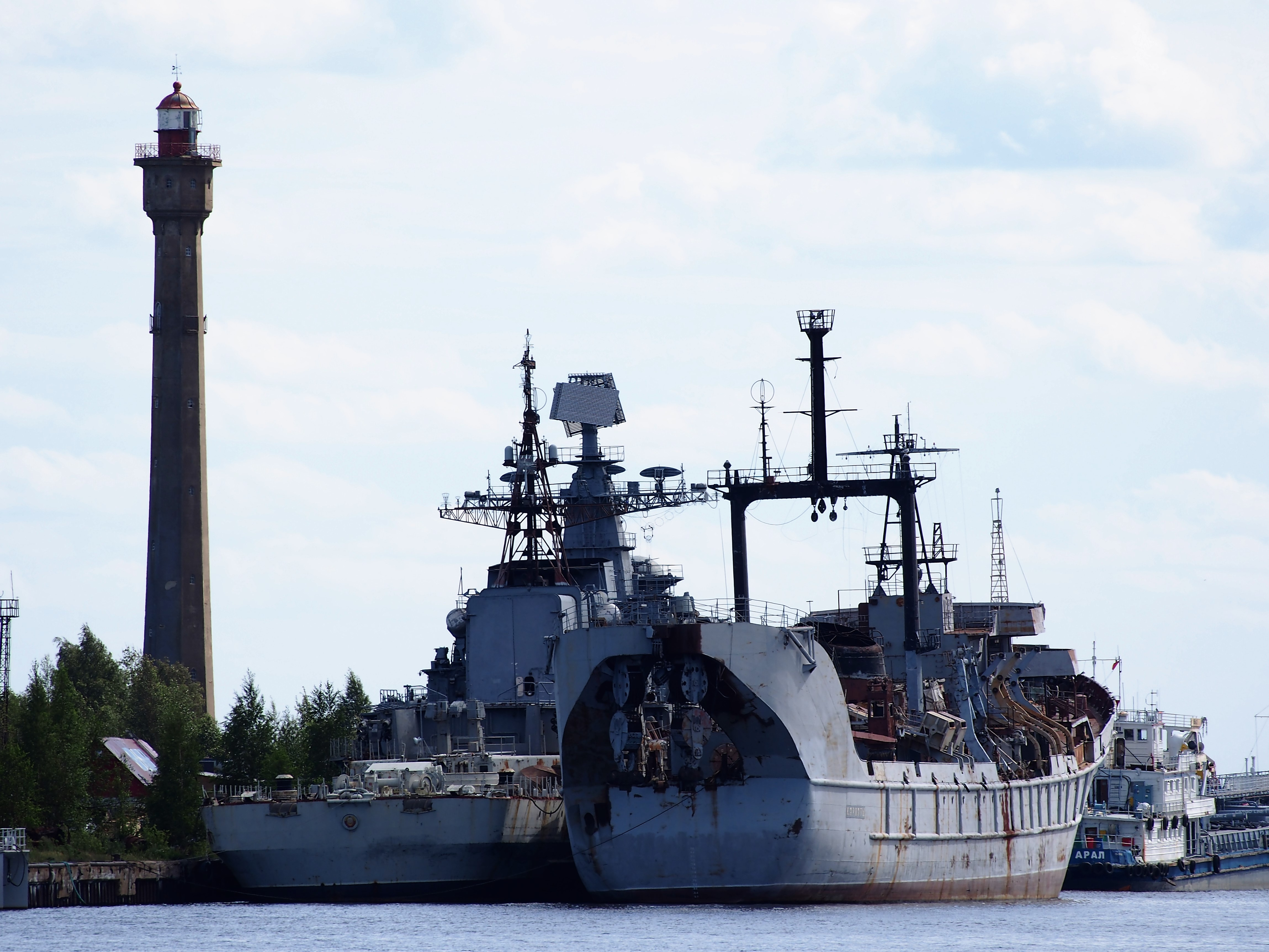 Port of Kronstadt: Rastoropnyy (420), Karpaty and oil tanker Aral; Расторопный (420), Карпаты и грузовое нефтеналивное судно Арал